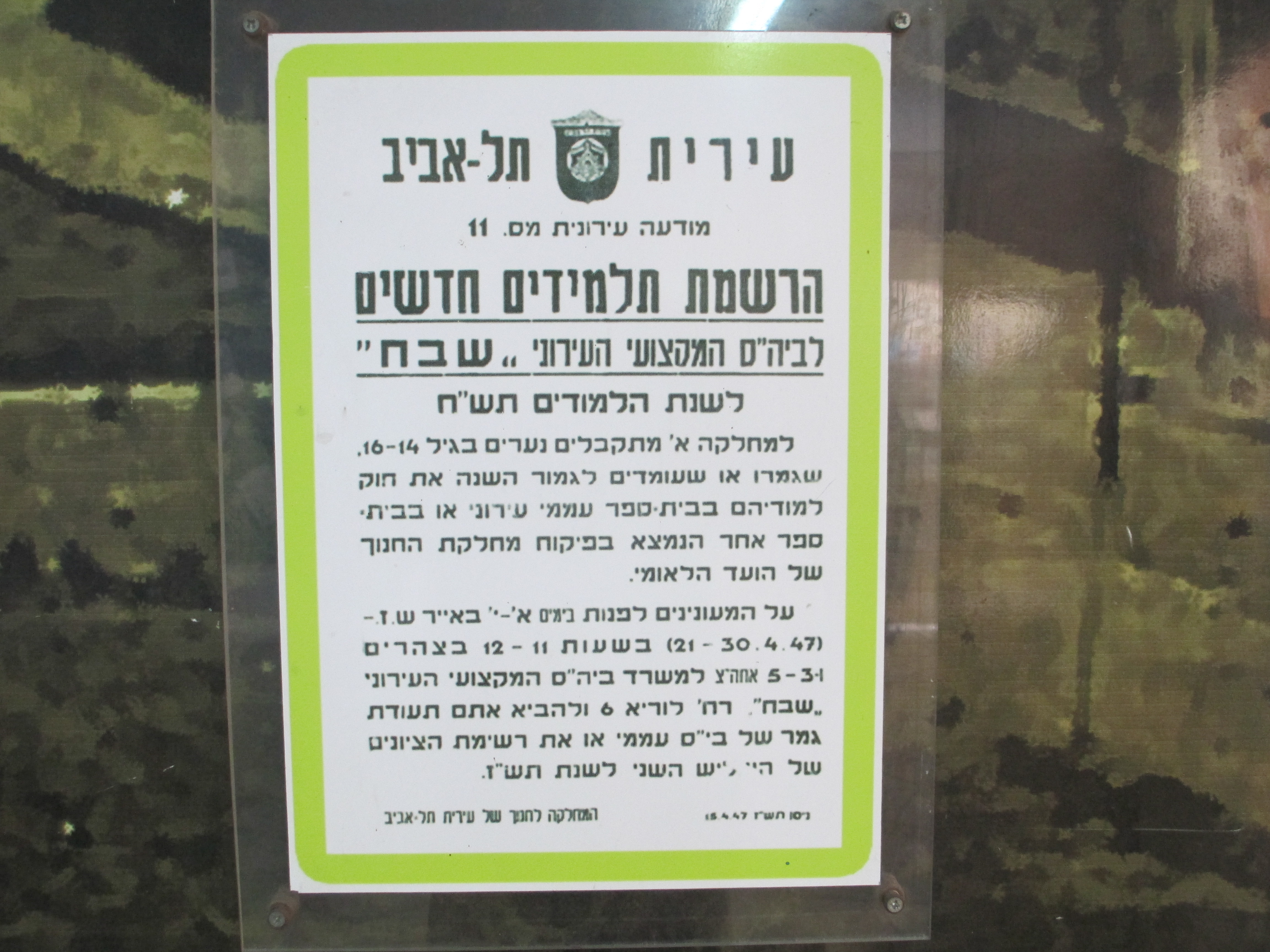 הודעת הרשמה לבית הספר שבח כשהיה עדיין בבניין "סיליקט" ברחוב לוריא בתל אביב